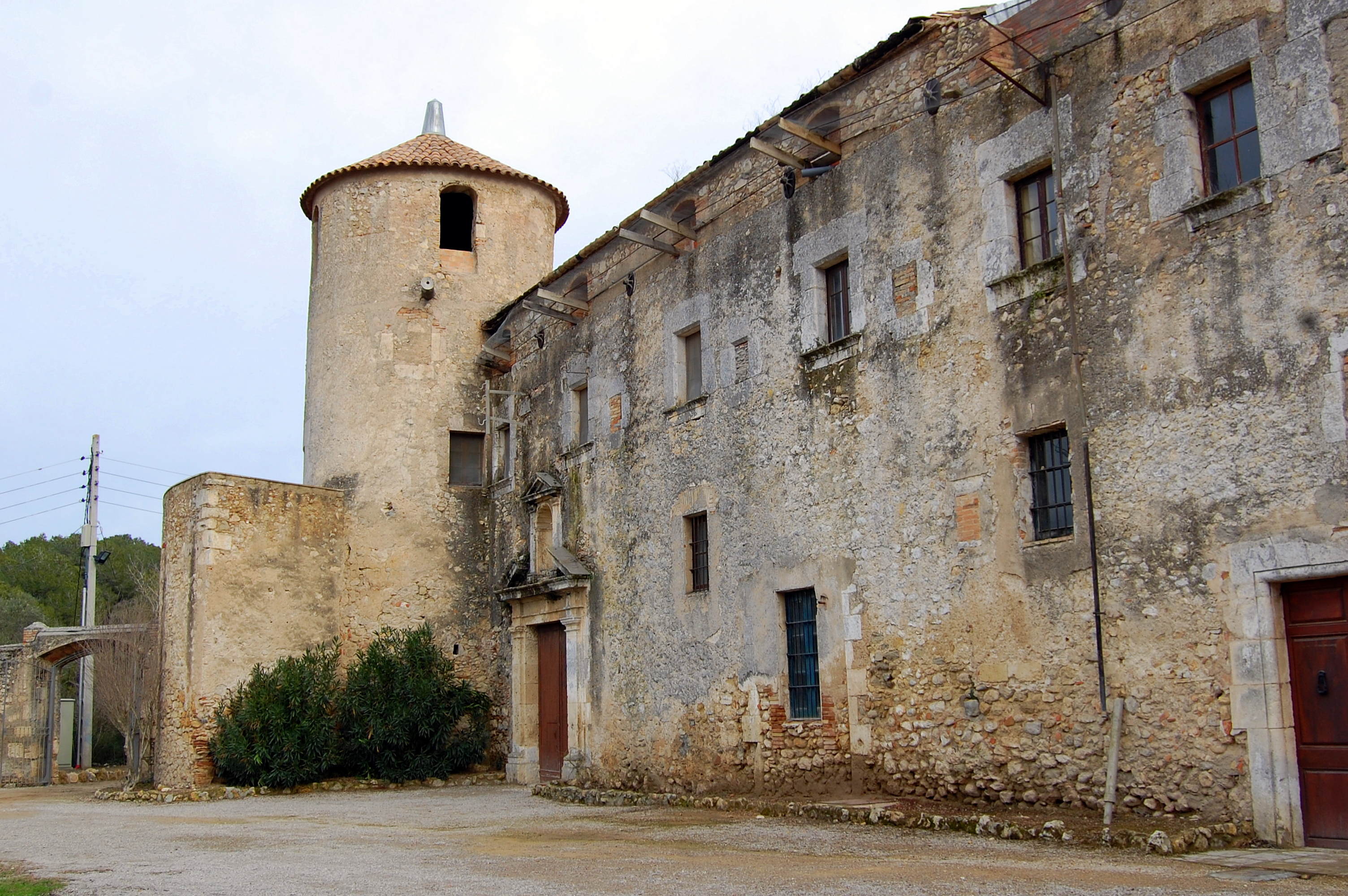 Castell-Convent de Penyafort (Santa Margarida i els Monjos)